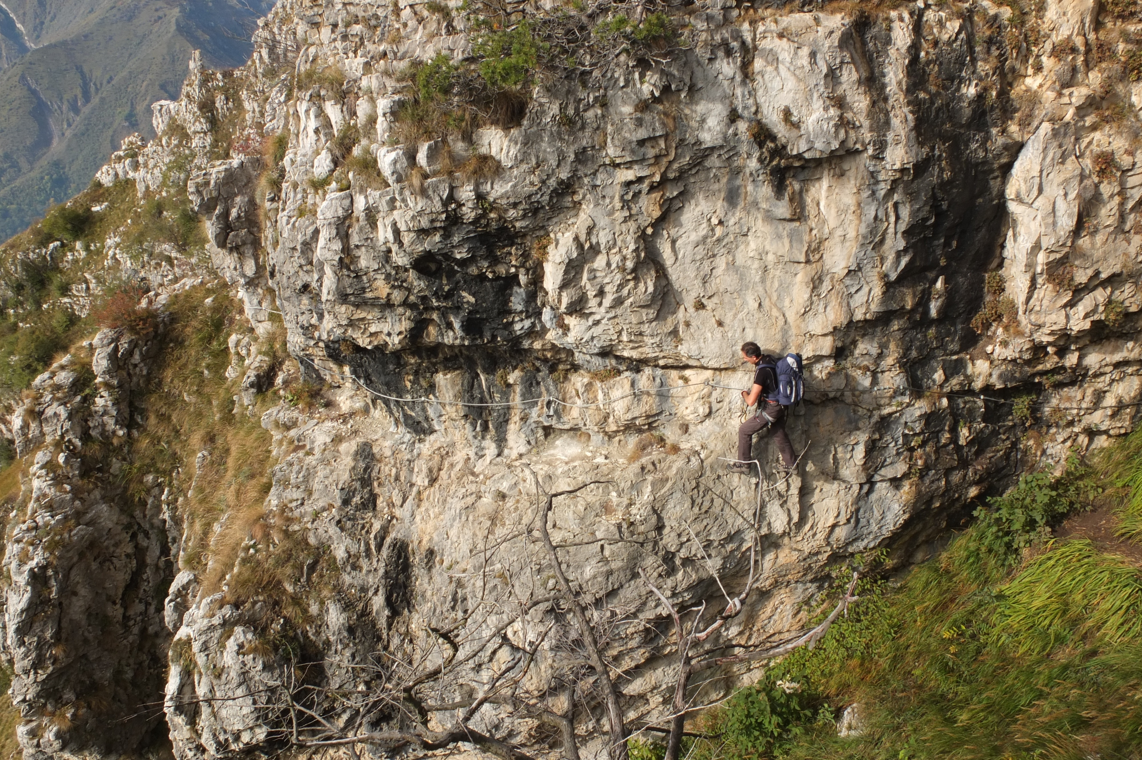 Passaggio in cengia sulla Ferrata Nasego